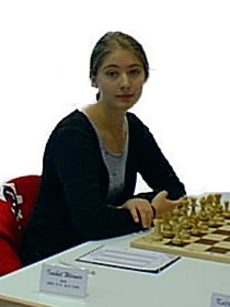 Isabel Werner (spätere Isabel Delemarre), 1998 in Schierke bei der Deutschen Schachmeisterschaft der weiblichen Jugend U20.